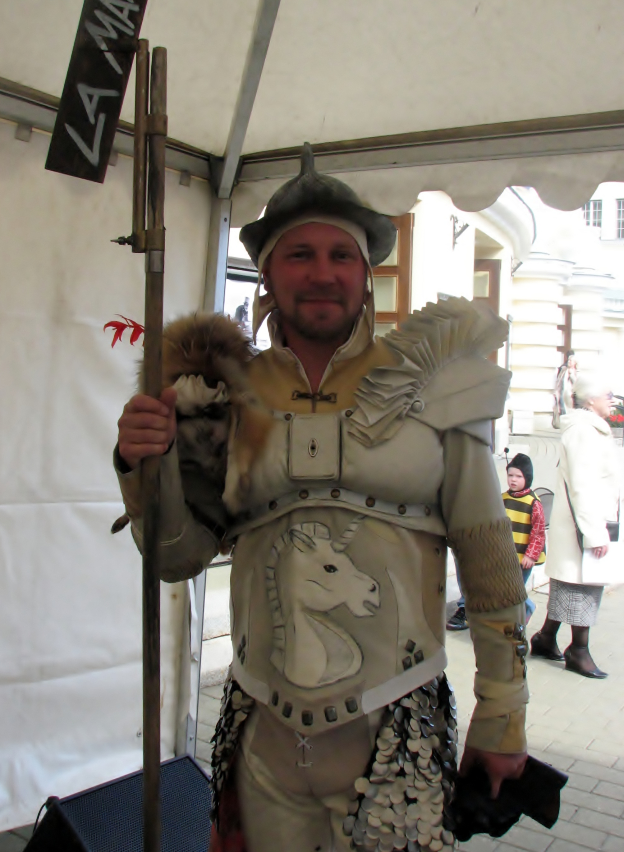 René Soom Estonia teatri 107. hooaja avamisel